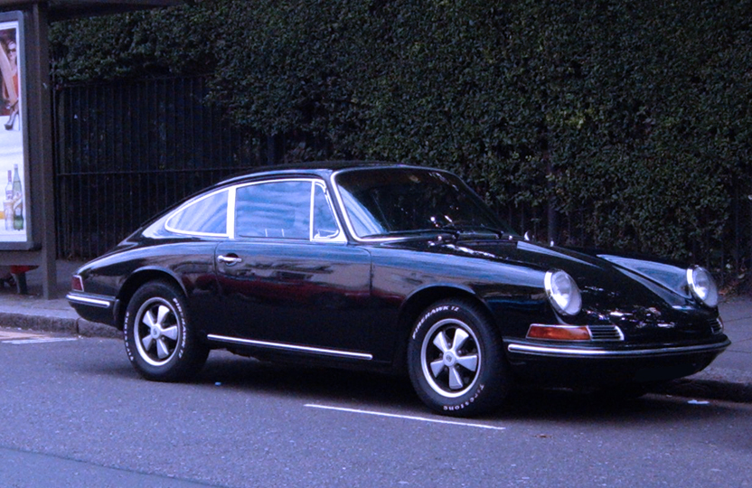 Porsche 911